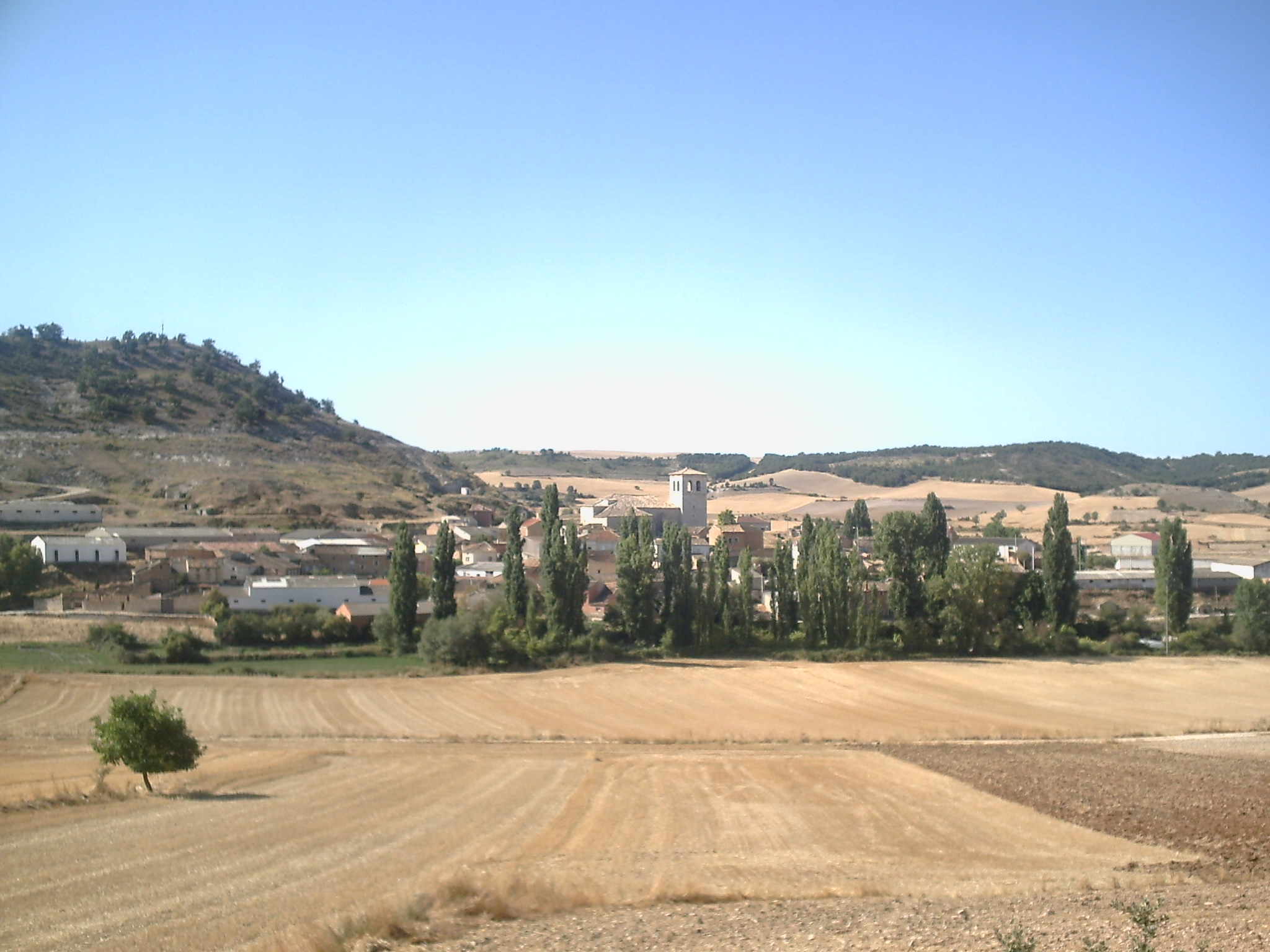 Vista desde la carretera de Tabanera.